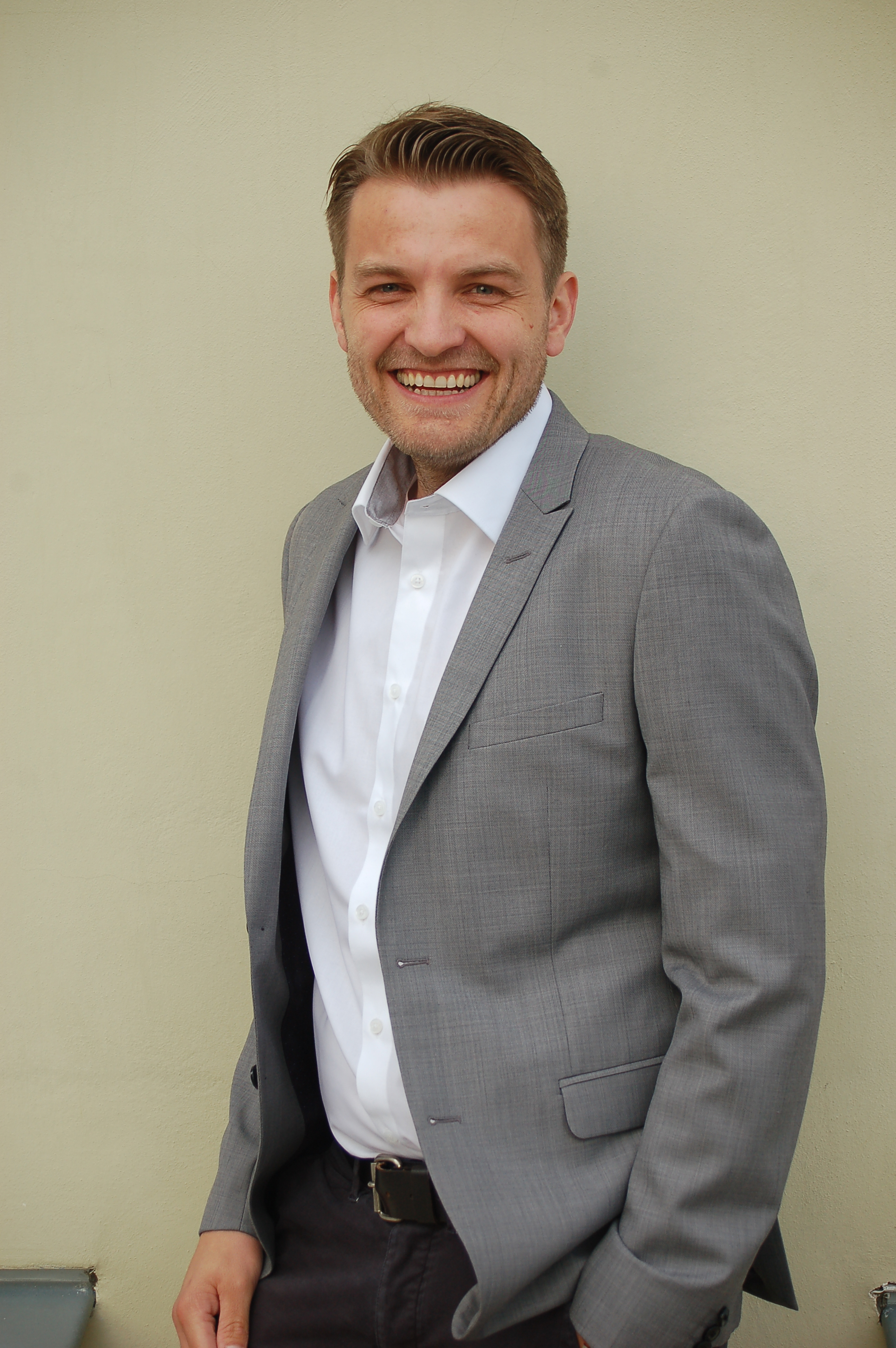 Autorenlesung Comic Roman Autor